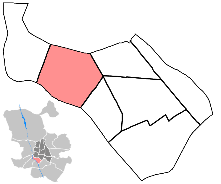 Mapa del barrio de las Acacias. Arganzuela. Madrid. España